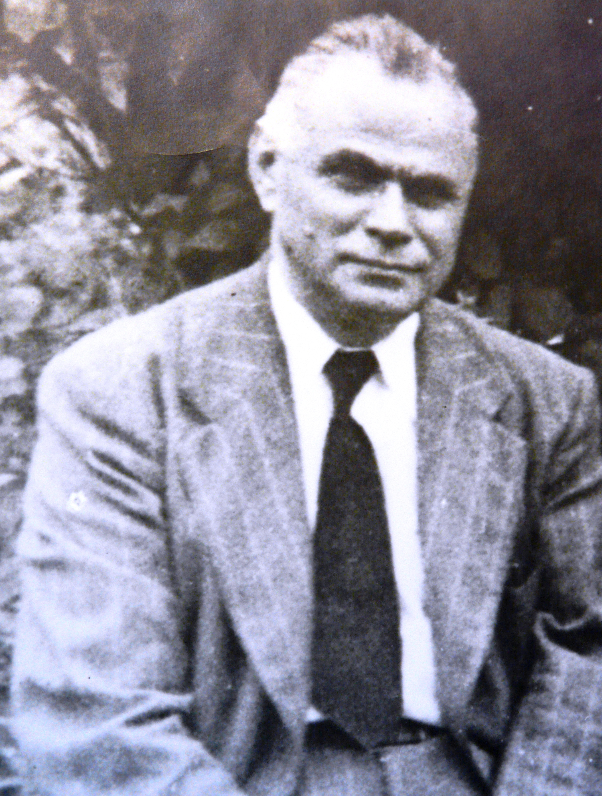 Φωτογραφια Σούλη